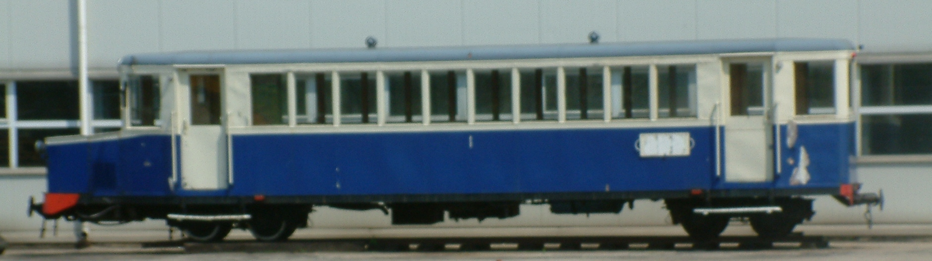 Diesel railcar MBxc1-41 "Ryjek" in Forteczna tram depot, Poznań